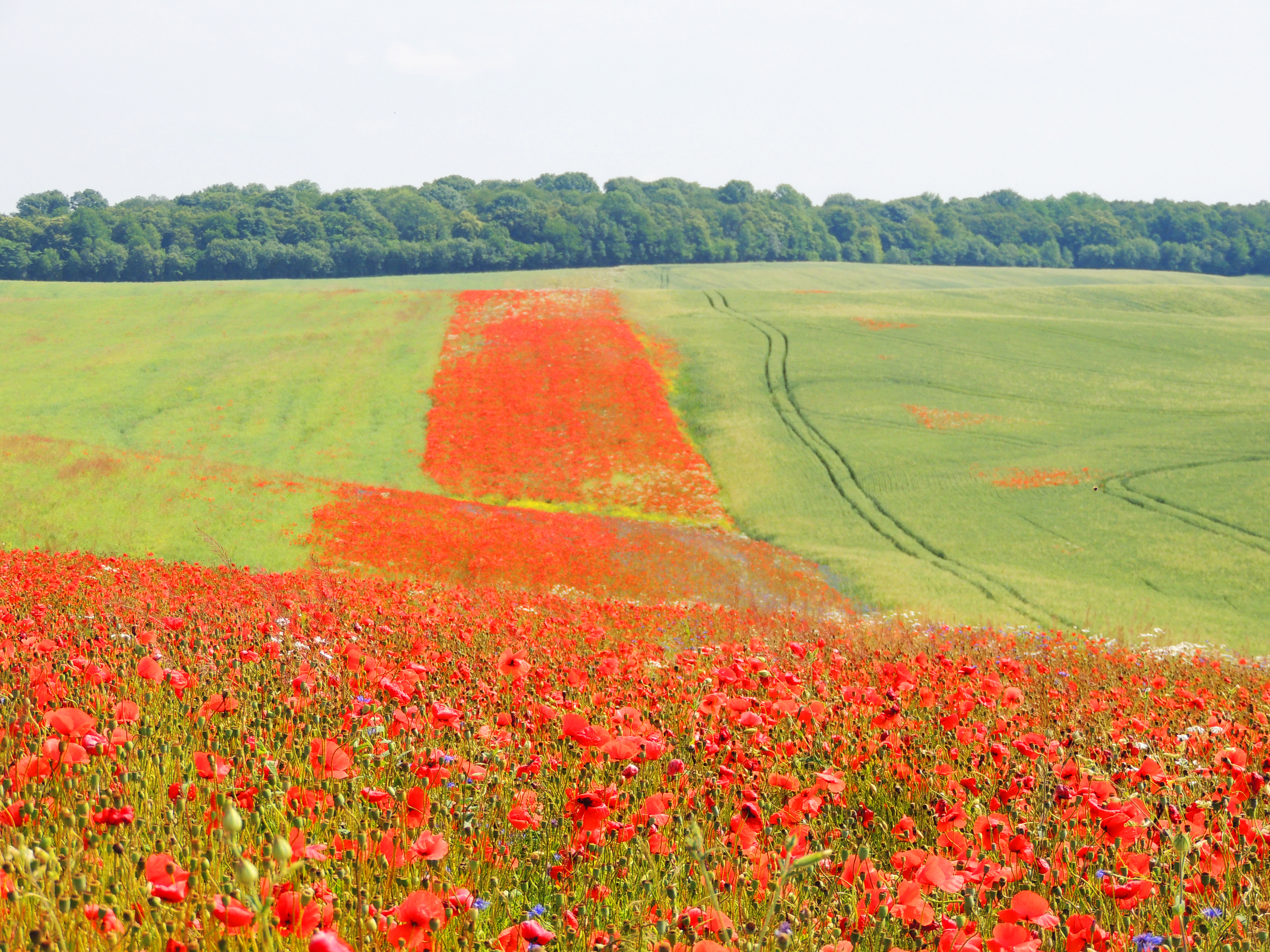 Макове поле в селі Антонівка, луцбкого району Волинської області